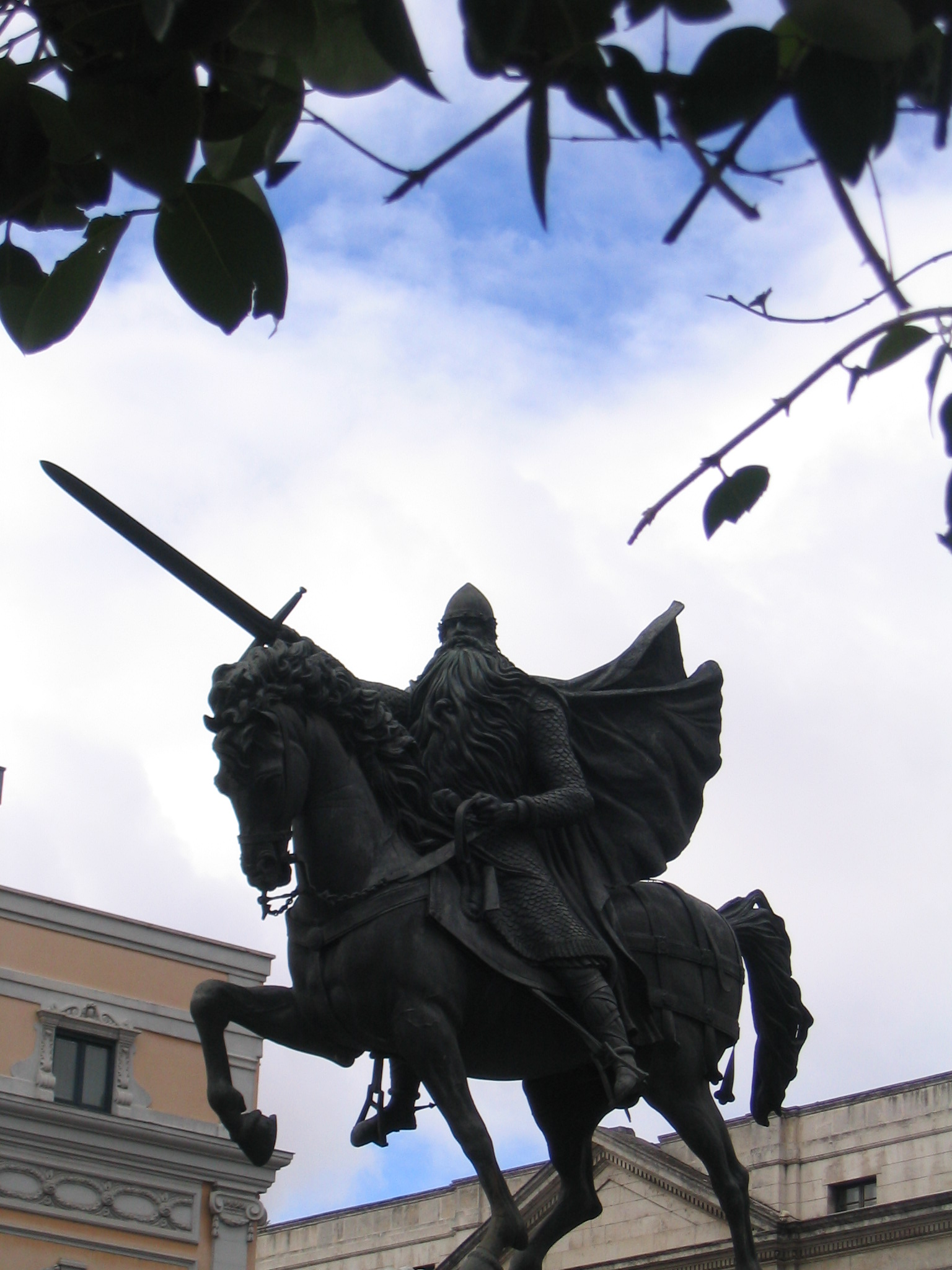 Estata ecuestre del Cid, localizada en la ciudad de Burgos, EspañaBurgos-Estatua del Cid